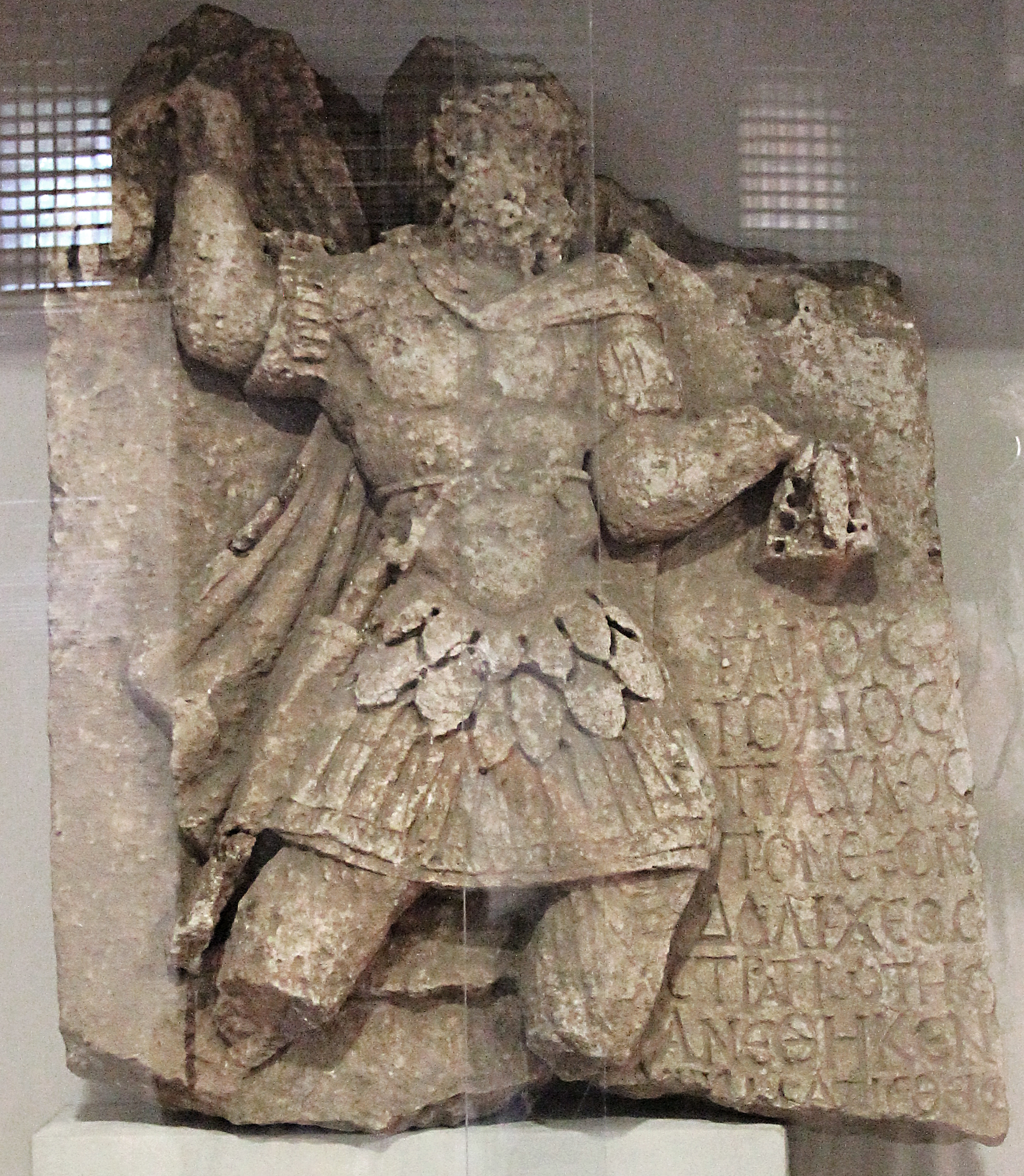 Weihrelief des Jupiter Dolichenus aus Perrhe, im Museum von Adıyaman, Türkei